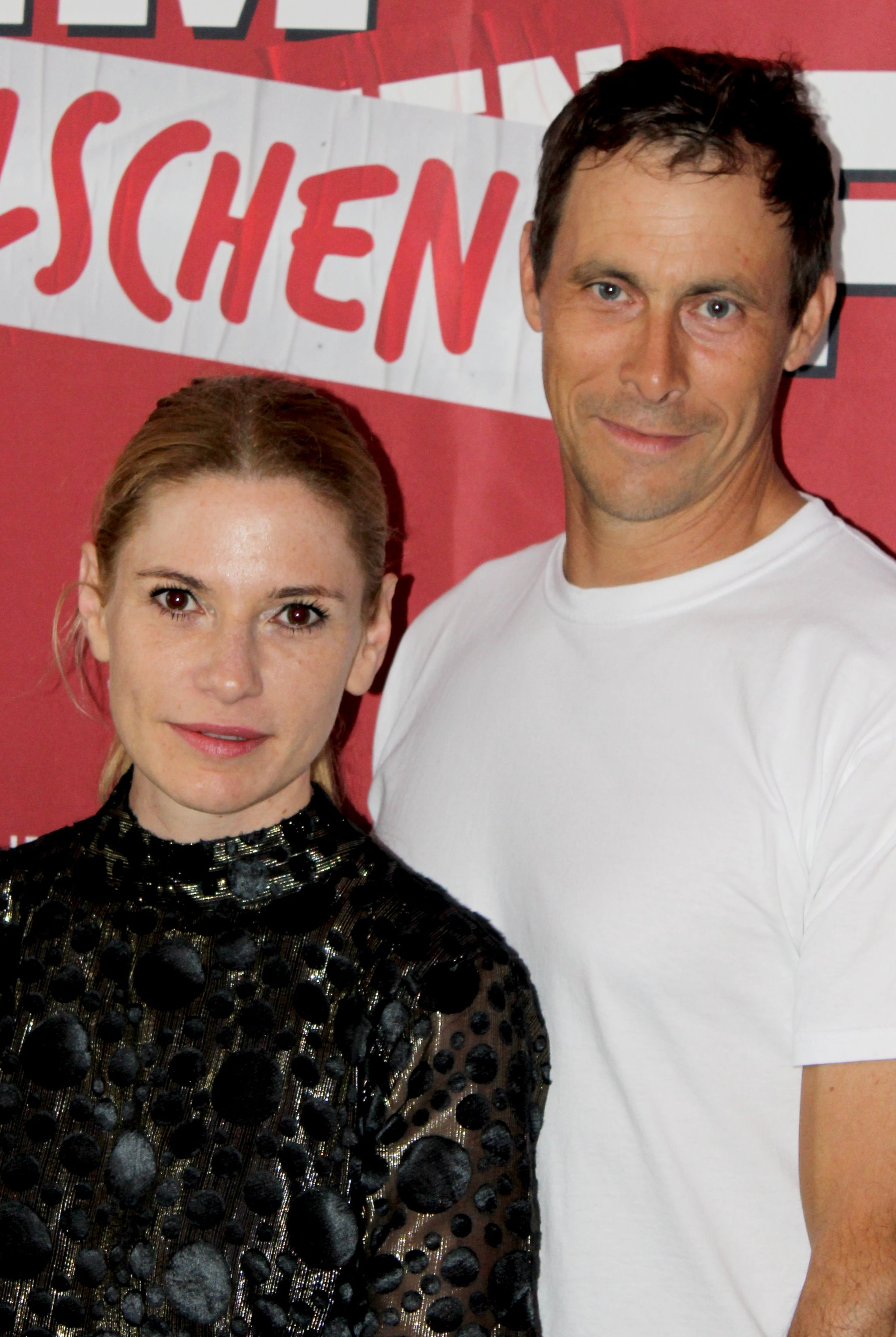 40211 Düsseldorf, Klosterstraße 78. Bambi Filmstudio. Am Dienstag, den 29.5.2018 wurde im Filmkunstkino Bambi in Düsseldorf die NRW-Premiere des neuen Films von der Regisseurin Laura Lackmann "ZWEI IM FALSCHEN FILM" gefeiert. Aufnahme von 2018.